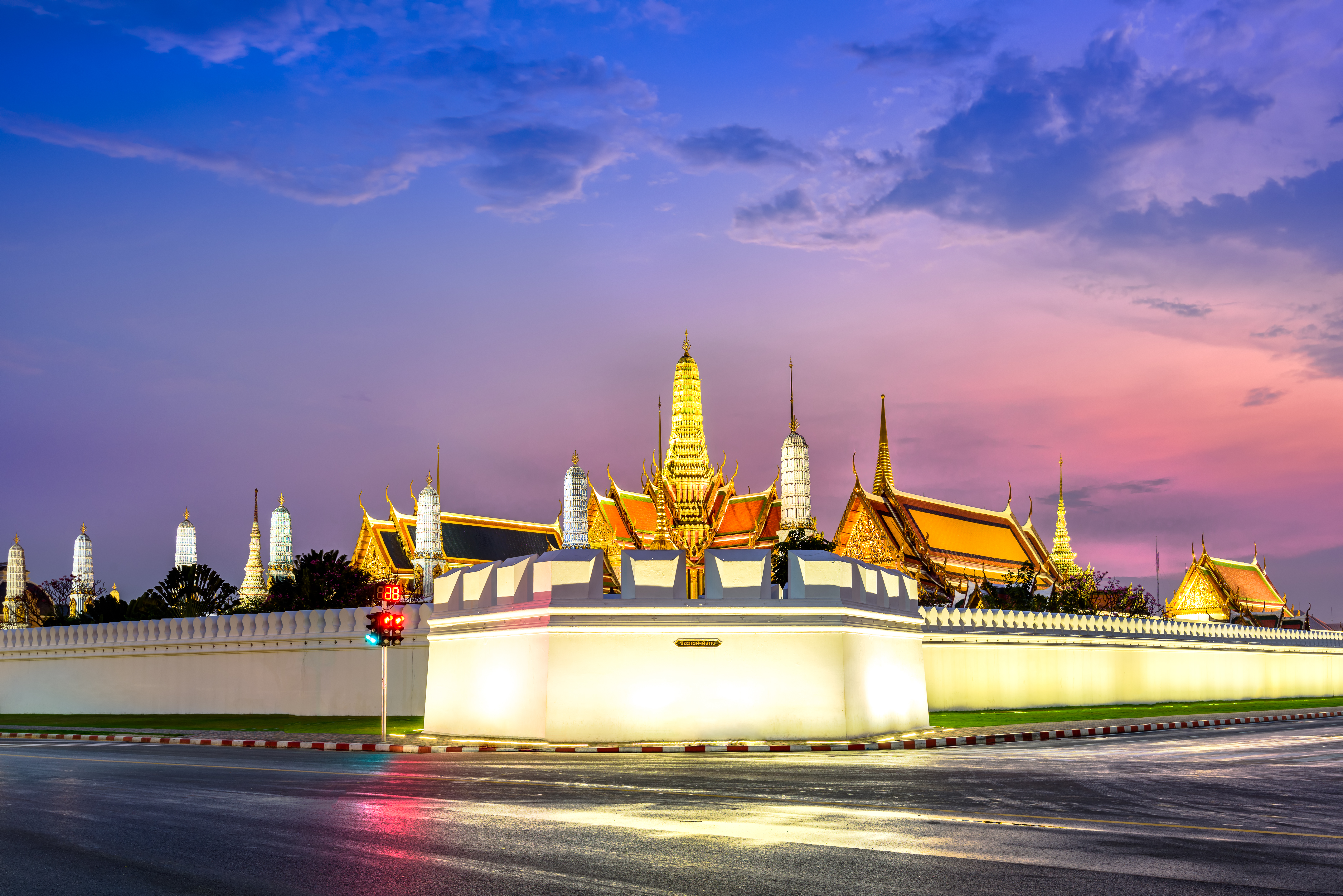 พระบรมมหาราชวังและวัดพระศรีรัตนศาสดาราม